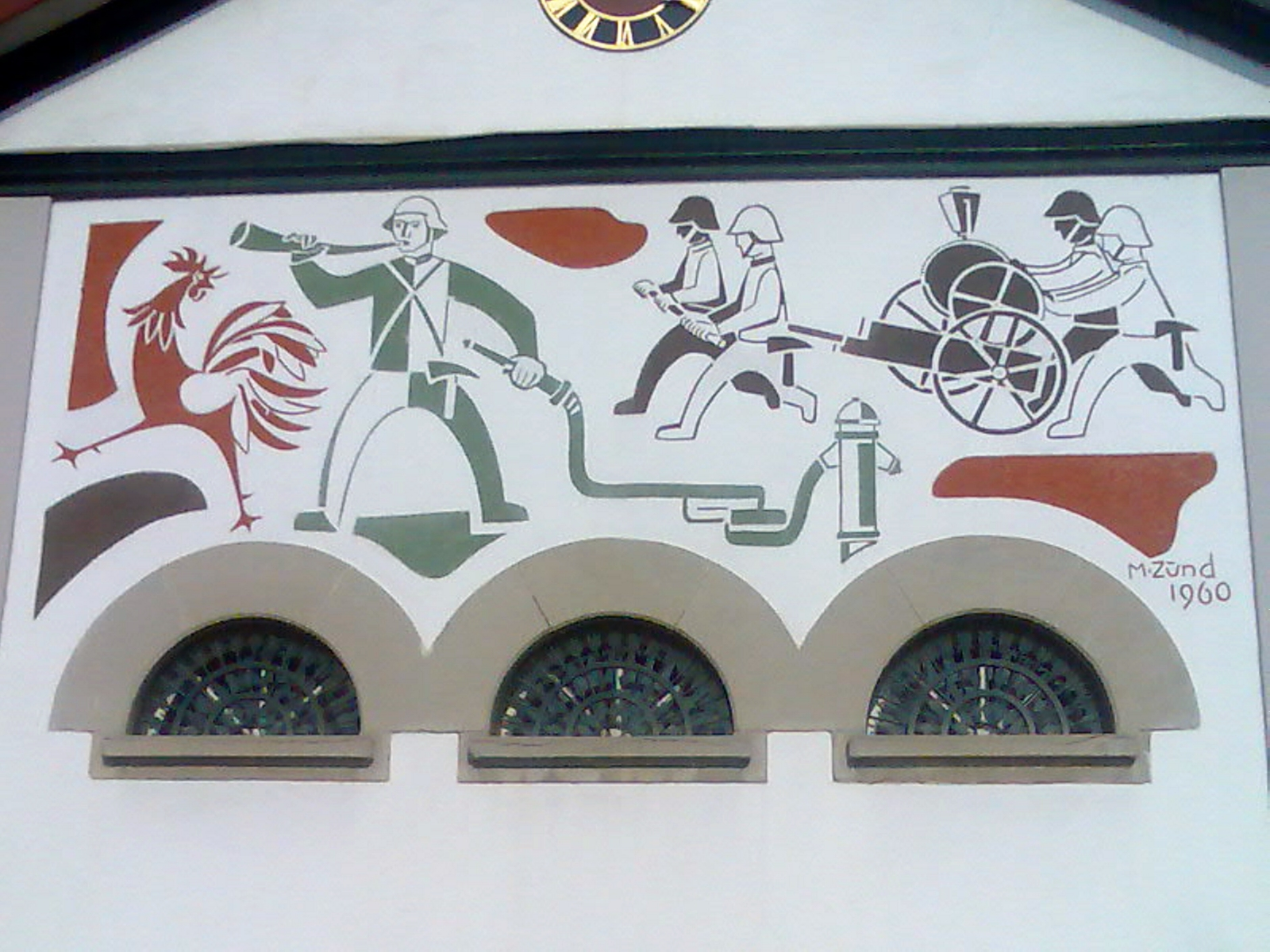 südliche Seitenfassade des Spritzenhauses (ehemaliges Feuerwehr-Depot) in Rebstein SG, über den drei kleinen Bogenfenstern ist ein Gemälde des Künstlers Zünd Meinrad (Zünd Mädy) aus Balgach SG